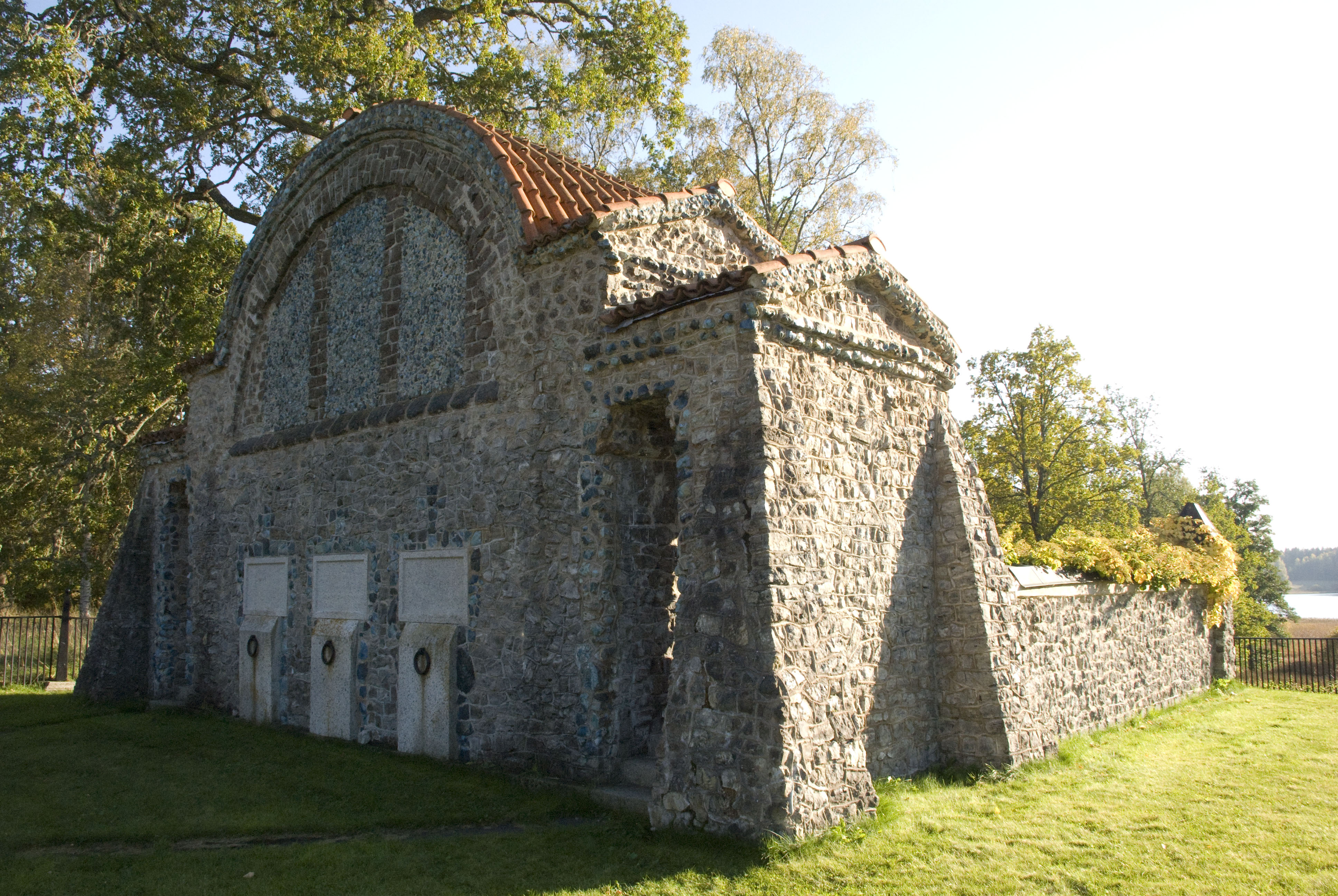 Hermanssons mausoleum. Skinnskatteberg, Västmanland